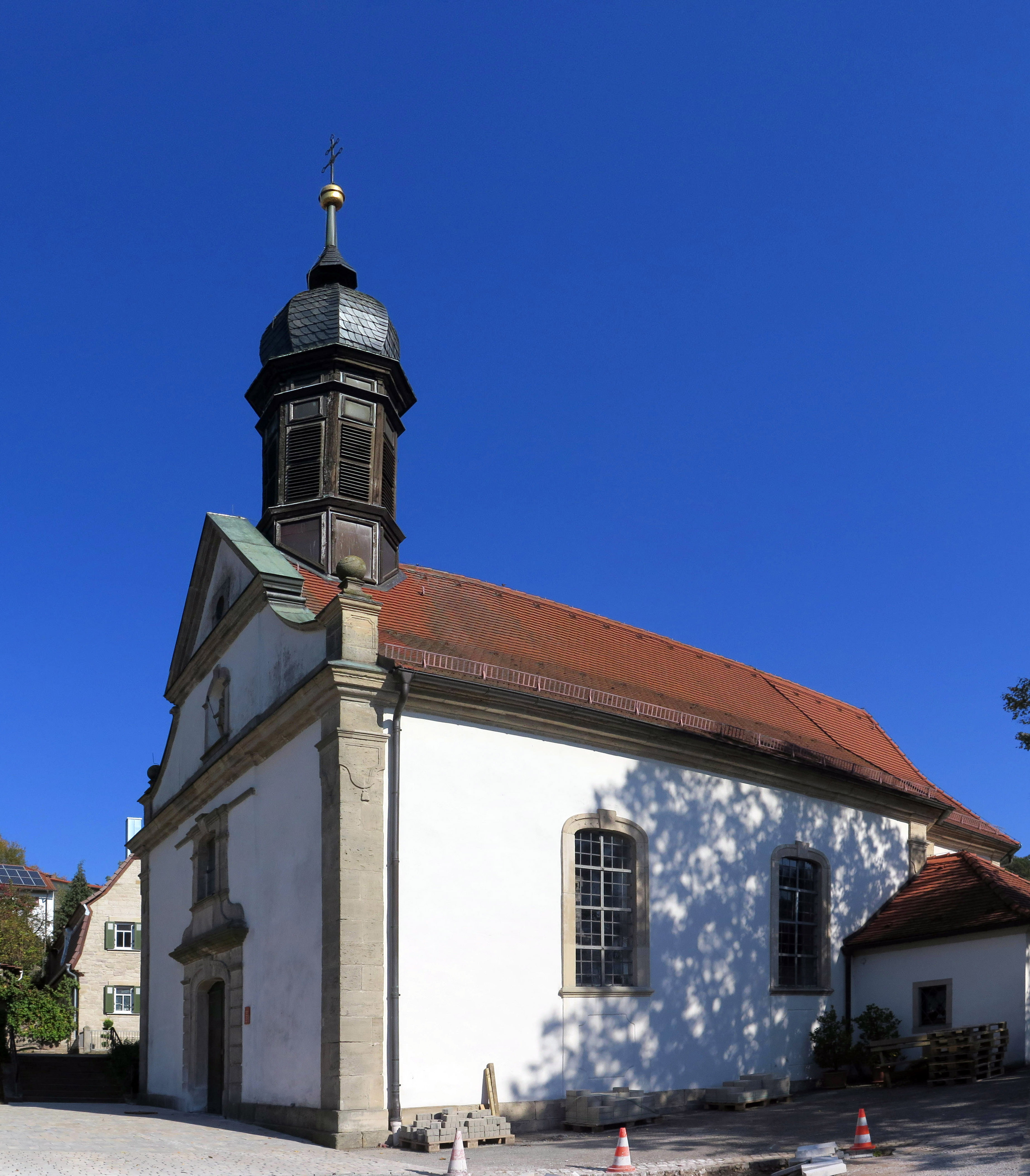 Katholische Kuratiekirche St Wendelin, Saalbau mit eingezogenem Chor, Giebelfassade, Satteldach, Dachreiter mit Zwiebel, und Werksteingliederungen, 1766 erbaut, Portal bezeichnet 1770; mit AusstattungThis is a photograph of an architectural monument.